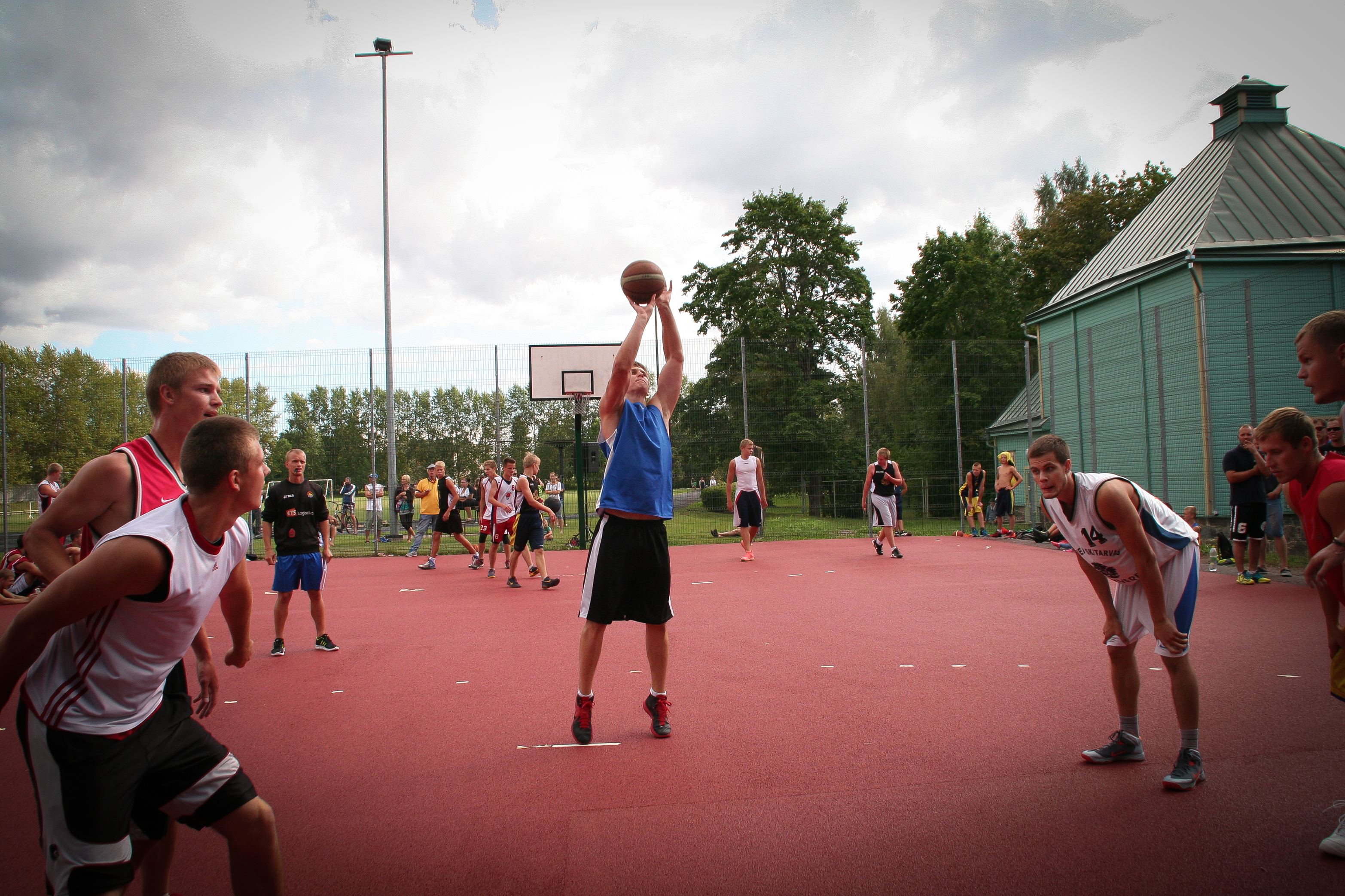 Spordi- ja muusikapäev Kadrinas 2014